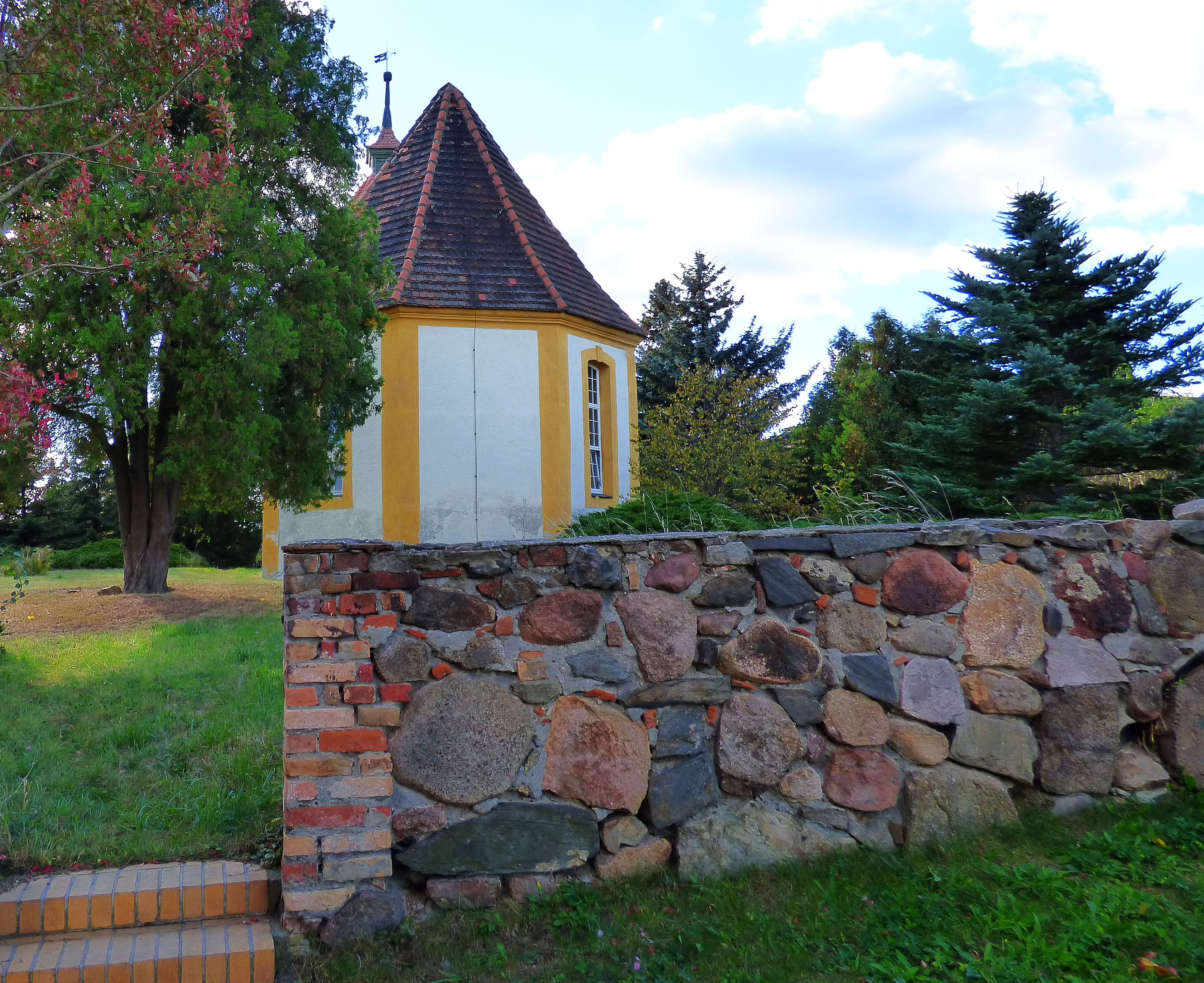 Dorfkirche Dreska